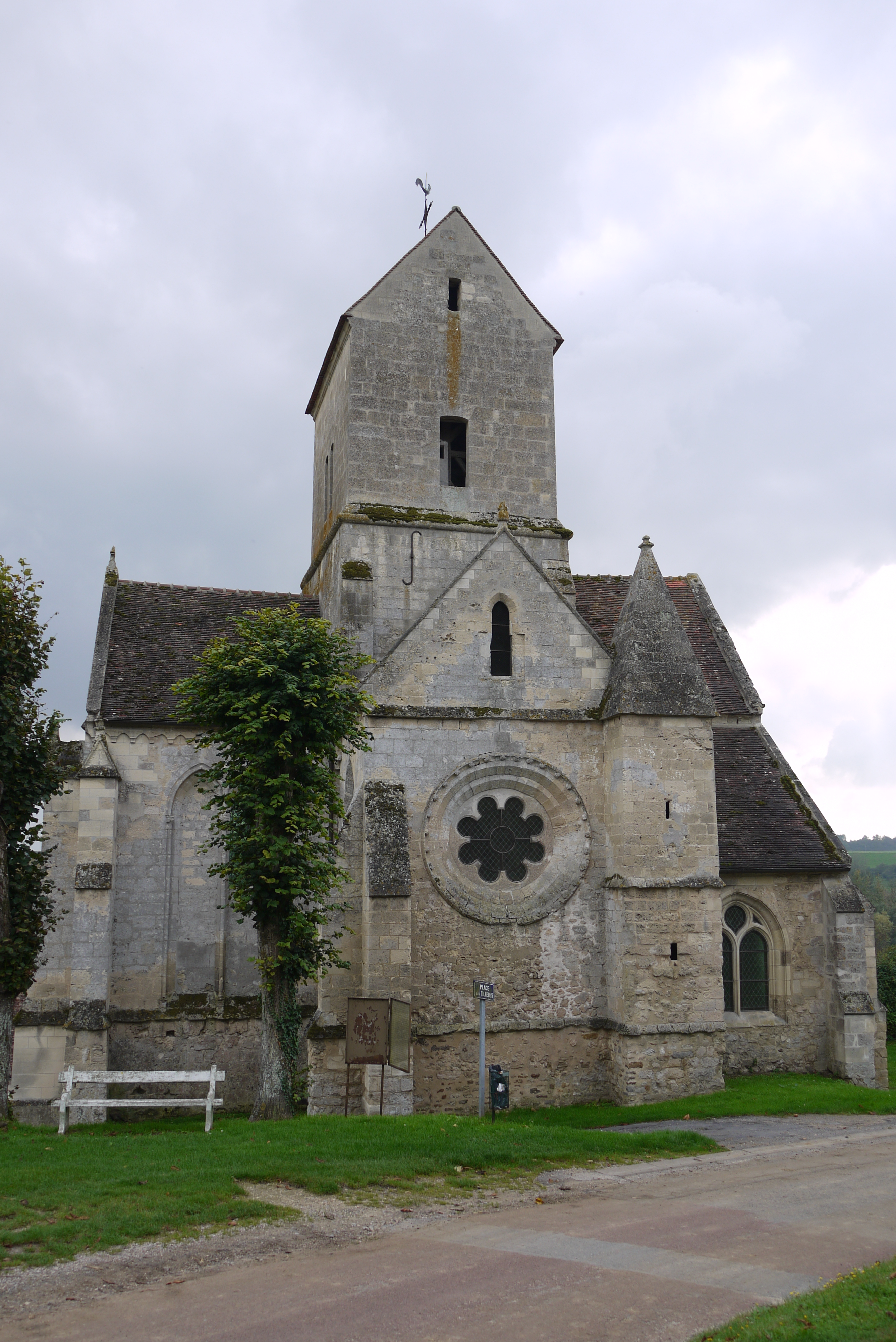 Église Saint-Crépin de Brumetz